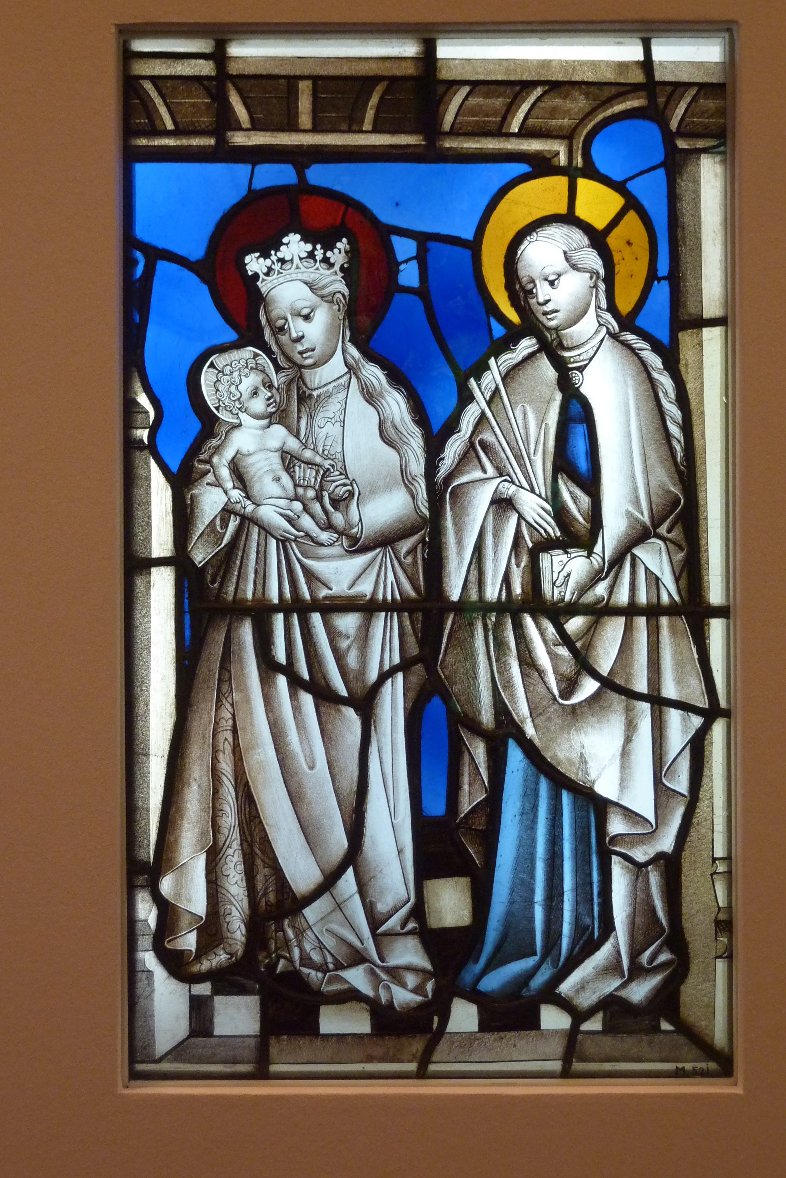 Bleiglasfenster im Museum Schnütgen in Köln, Darstellung: „Muttergottes und hl. Ursula“, Inventar-Nr.: M 521, siehe Brigitte Lymant: Die Glasmalereien des Schnütgen-Museums. Schnütgen-Museum, Köln 1983